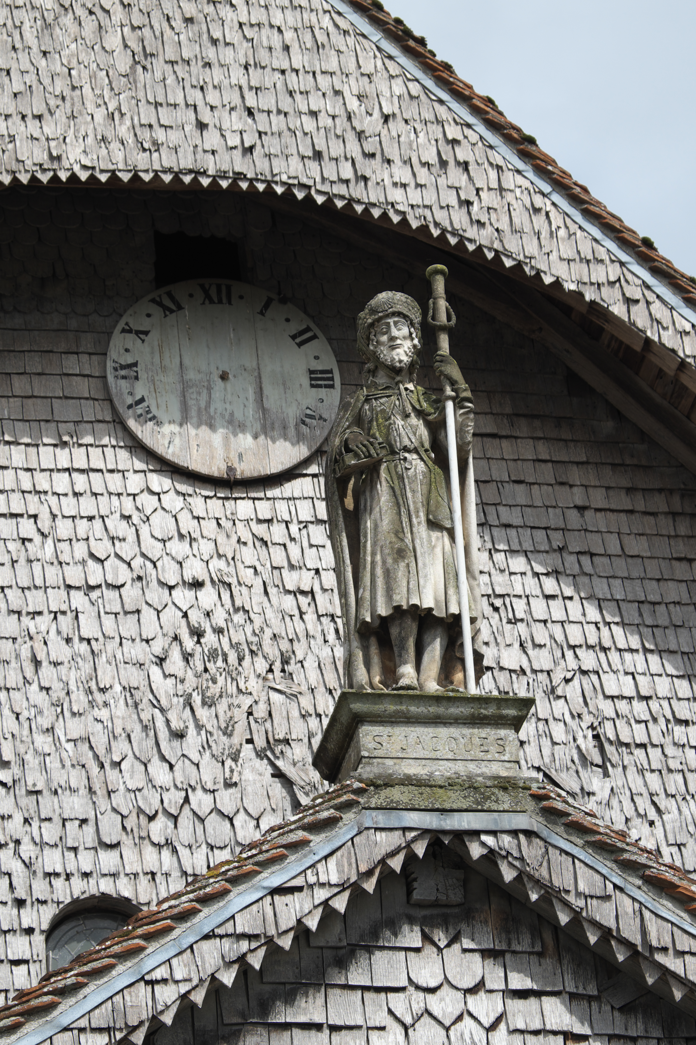 Katholische Kirche Saint-Jacques-et-Saint-Philippe in Lentilles im Département Aube (Champagne-Ardenne/Frankreich), Eingangsfassade mit Skulptur des Apostels Jakobus des Älteren aus dem 16. Jahrhundert.